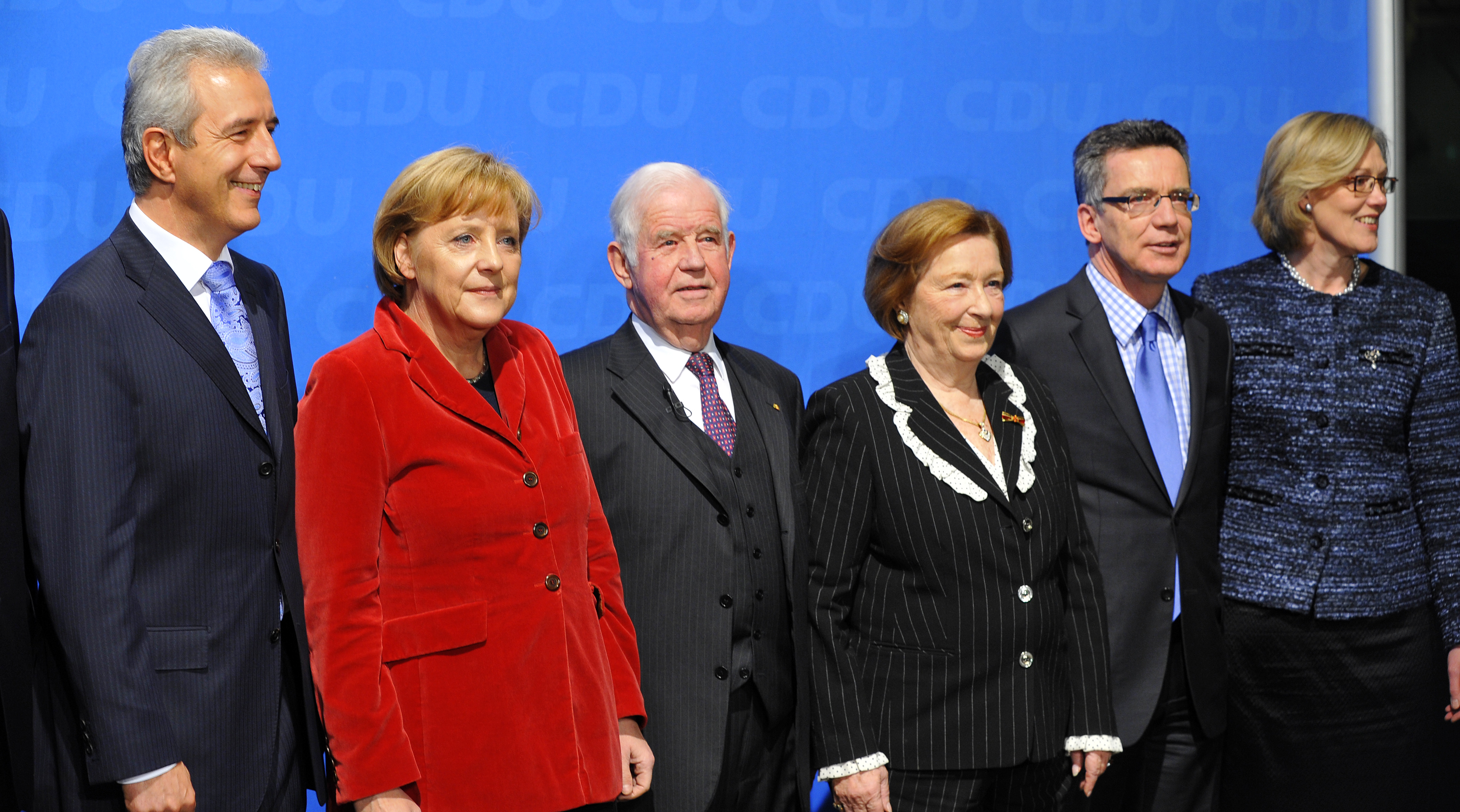 80. Geburtstag von Kurt Biedenkopf 2010 (in Dresden), zusammen mit Stanislaw Tillich, Angela Merkel, Ingrid Biedenkopf, Thomas de Maizière